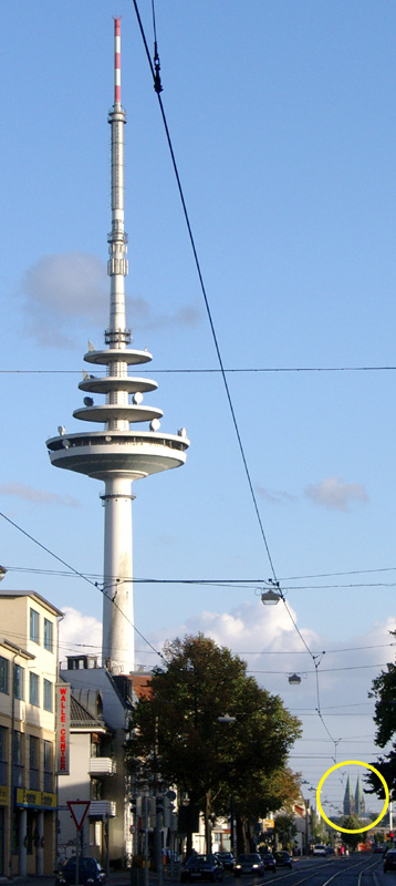 Dies ist der Fernsehturm (Fernmeldeturm) in Bremen, gesehen aus Bremen-Walle in südöstlicher Richtung (zum Stadtzentrum). Unten rechts, im gelben Kreis, ist der Bremer Dom zu sehen.